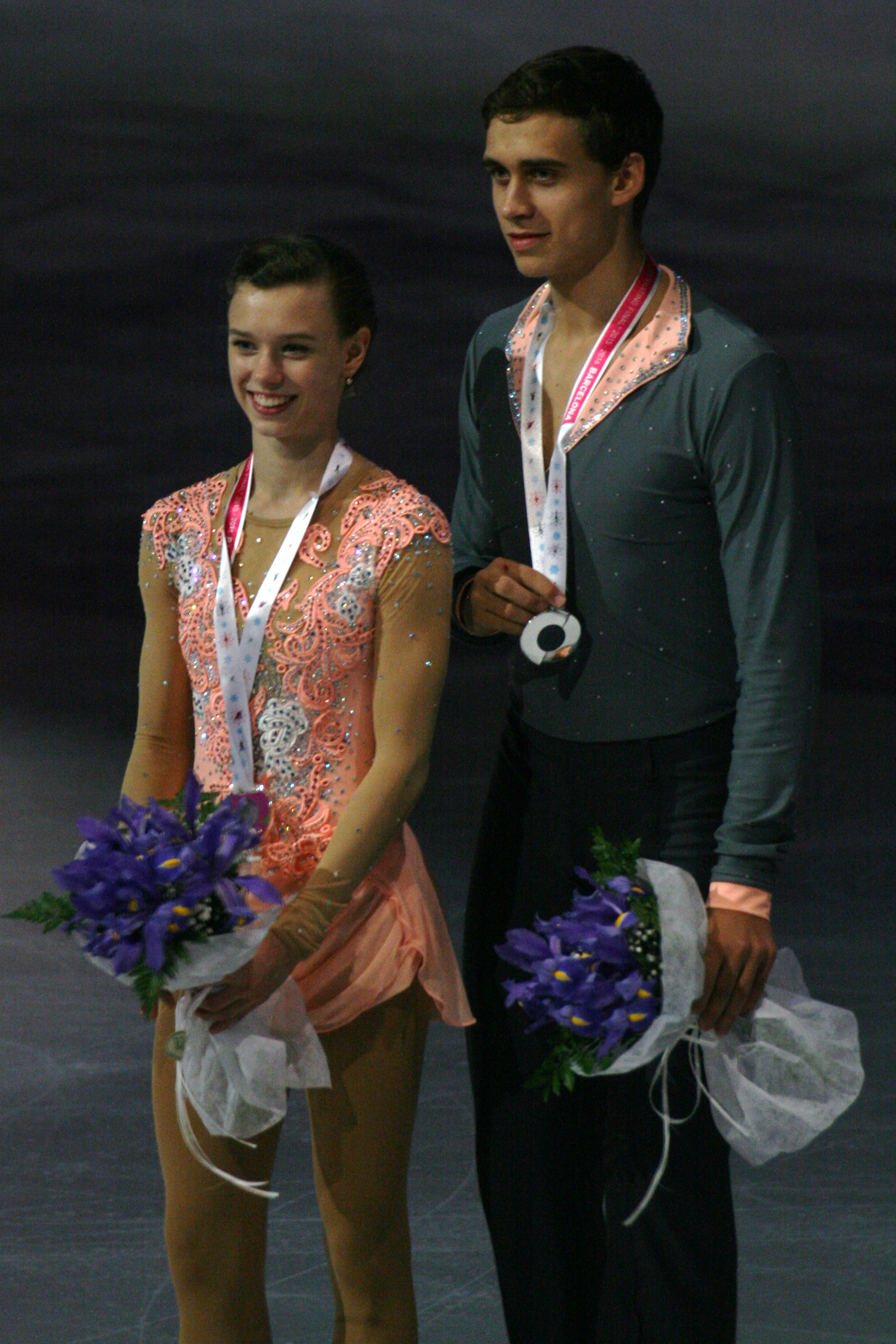 Анна Душкова и Мартин Бидар (Чехия) - 2е место на церемонии награждения победителей и призёров в парном катании на на финале Гран-при по фигурному катанию среди юниоров 2015-2016.